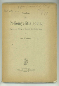 Ivar Wickmans Dissertation Studien über Poliomyelitis acuta. Zugleich ein Beitrag zur Kenntnis der Myelitis acuta (Stockholm 1905)